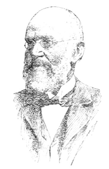 Otto Pfleiderer